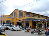 Mercado principal de coatepec